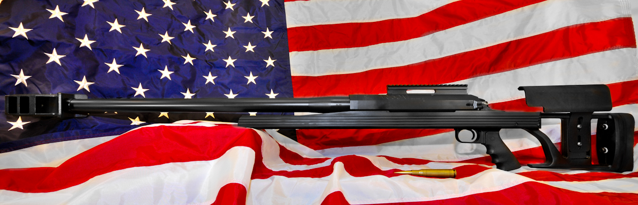 ArmaLite AR50-A1B